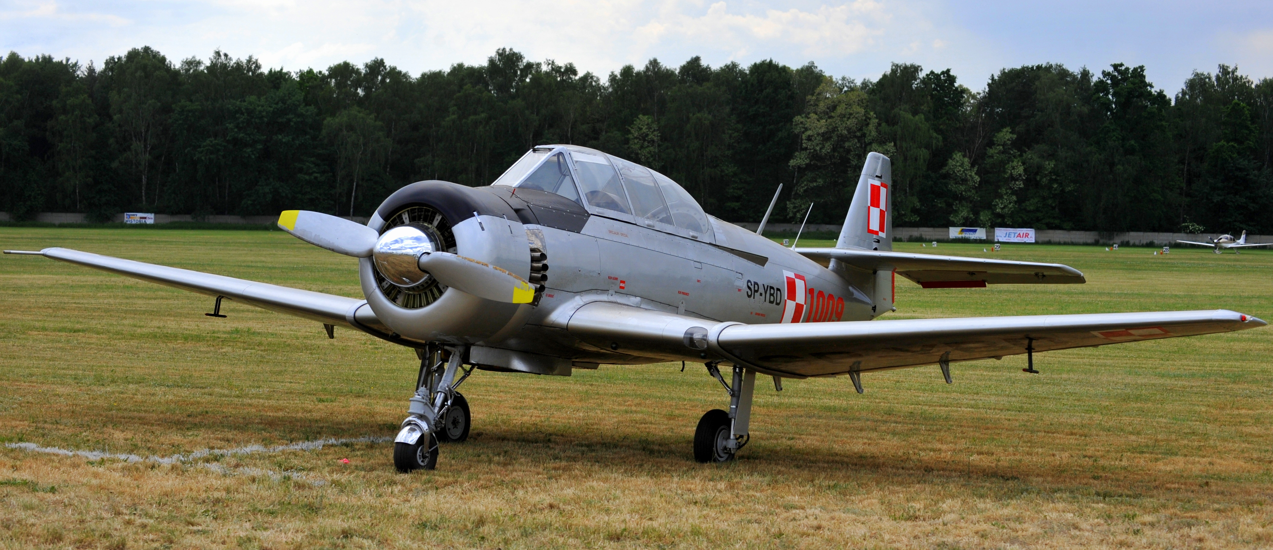 PZL TS-8 Bies